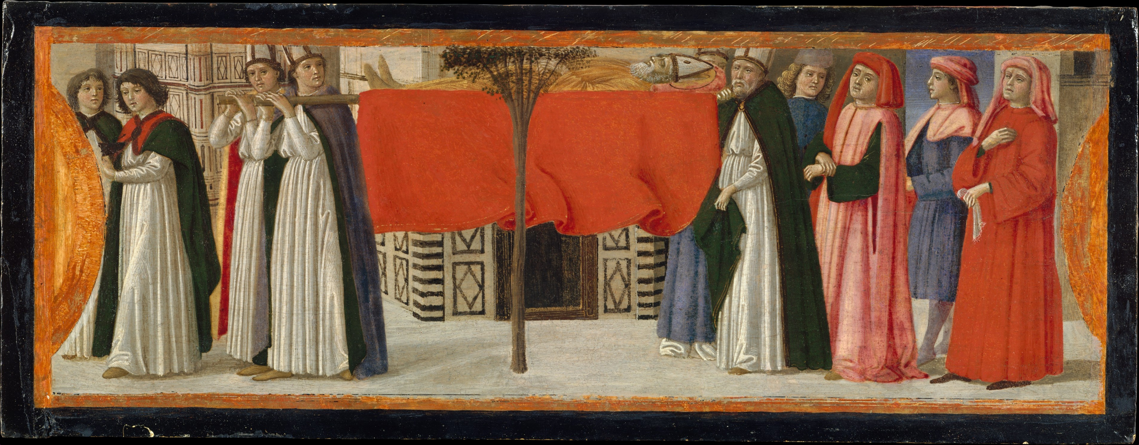 Painting, predella panel; Paintings